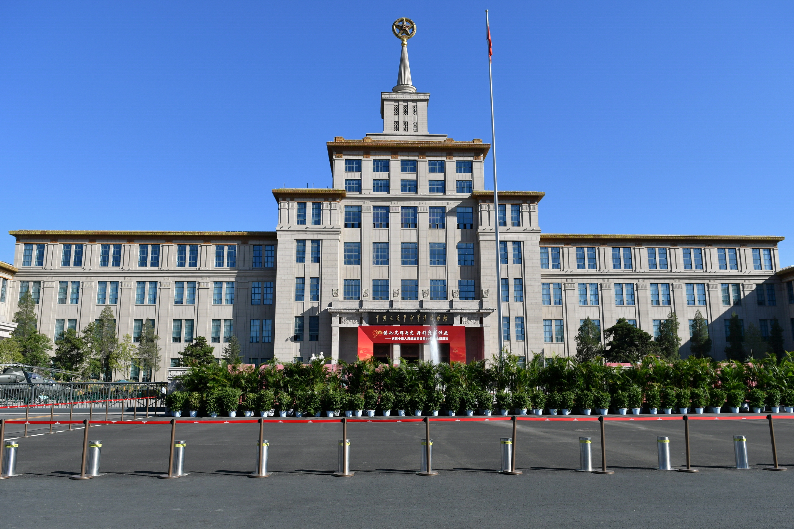 中国人民革命军事博物馆，2012年~2017年改造后重新开放。